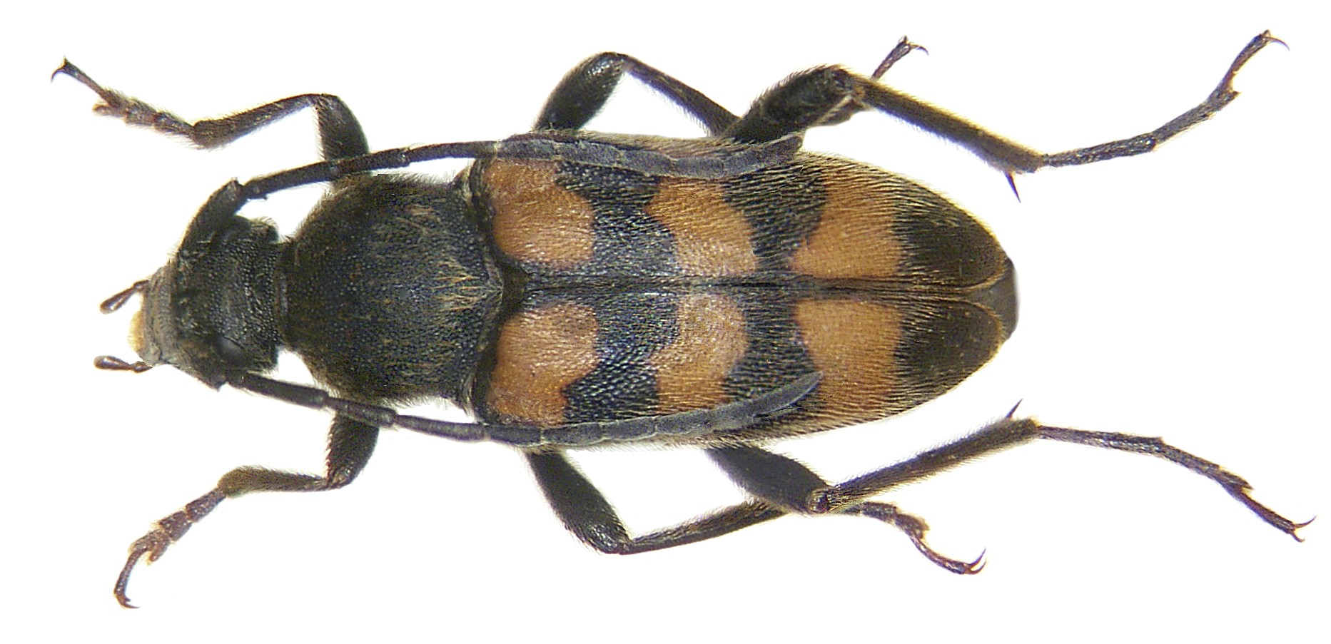 Familie: Judolia erratica (Dalman, 1817)] Grösse: 7-12 mm Verbreitung: Europa Ökologie: Entwicklung in trockenen Zweigen von Laubbäumen Fundort: Jugoslavien, Rabac leg. det. U.Schmidt, 1977 Foto: U.Schmidt, 2006